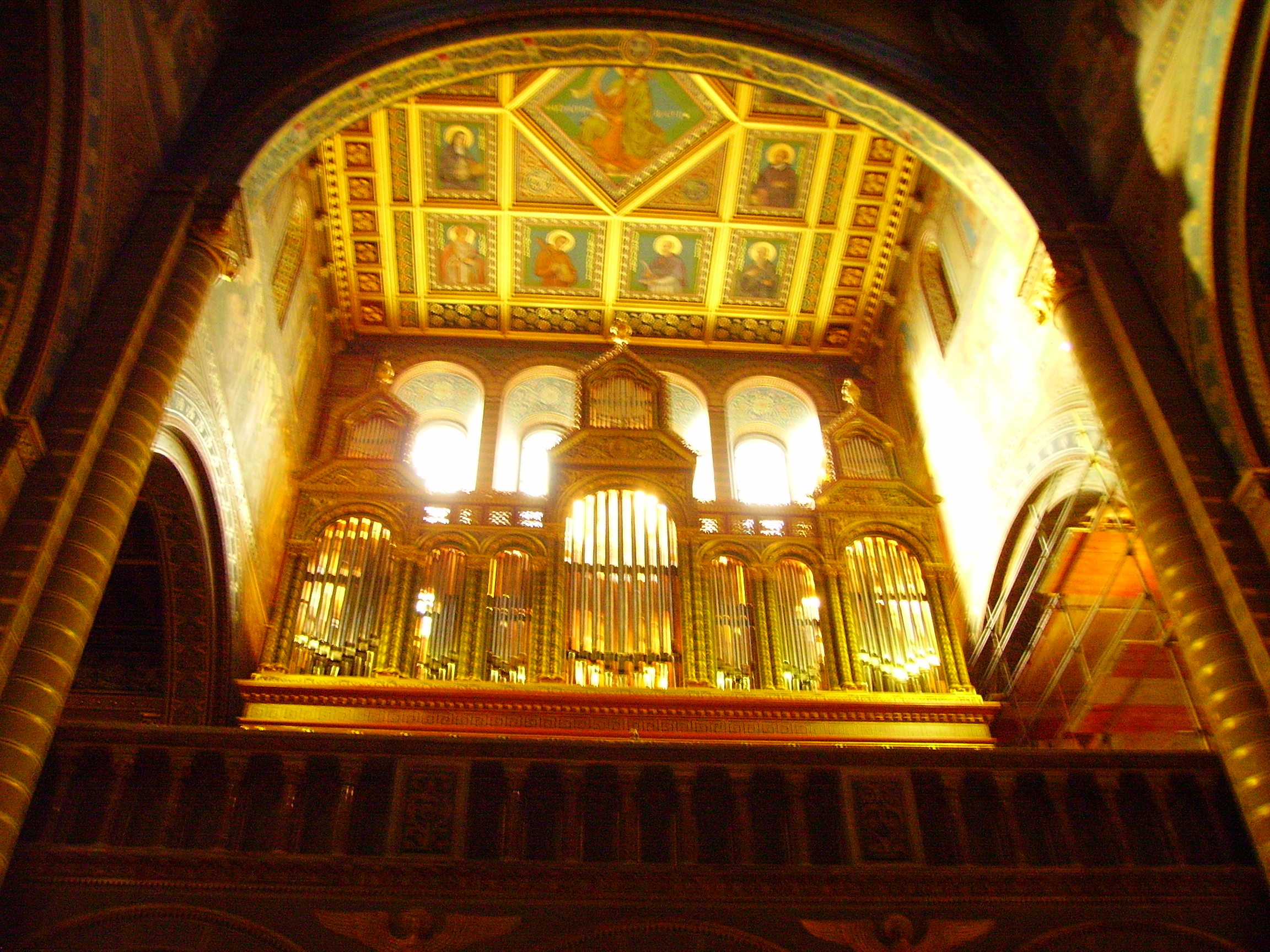 A pécsi székesegyház felújított orgonája több mint 6100 sípot foglal magába